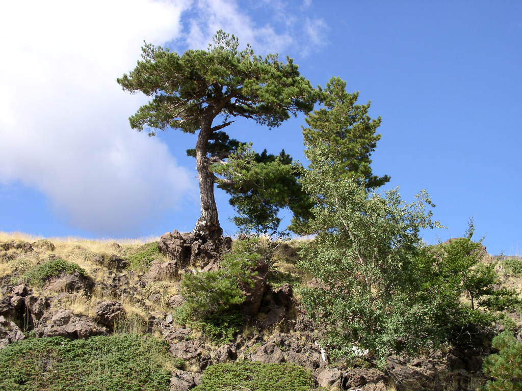 Pinus nigra on EtnaP8280015